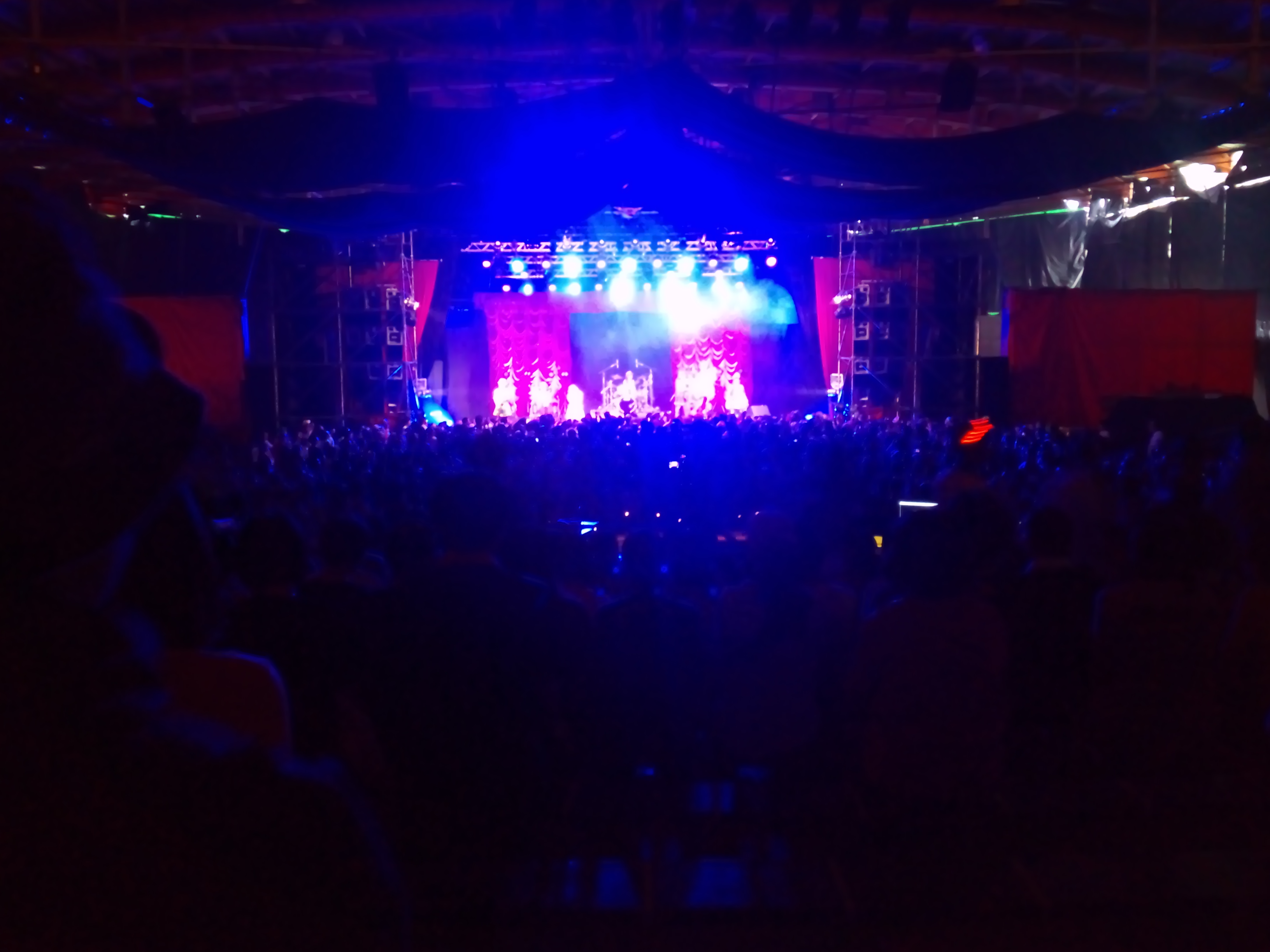 JOIN ALIVE 2015 チャラン・ポ・ランタンによるライブ中のVelvet Circus （出演者が設けた撮影許可時間のもの・通常はライブ中撮影禁止）